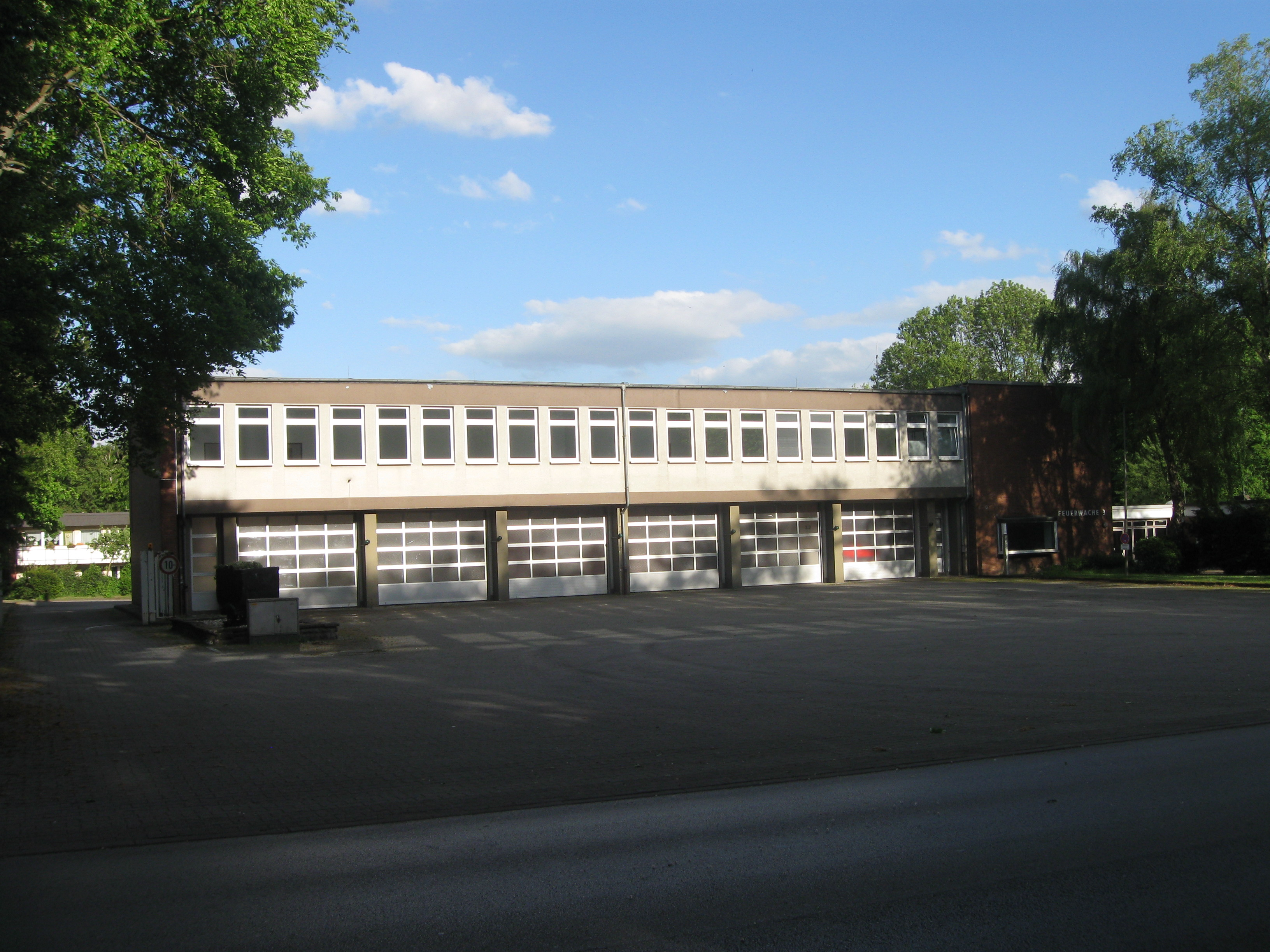 Freiwillige Feuerwehr Gelsenkirchen, Feuerwache 3 (Im Emscherbruch 30, Grenze Erle/Resser Mark)